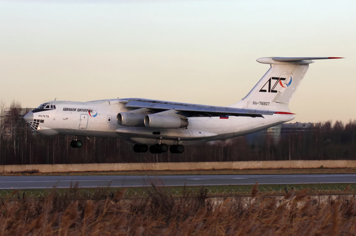 Aviacon Zitotrans Ilyushin Il-76TD